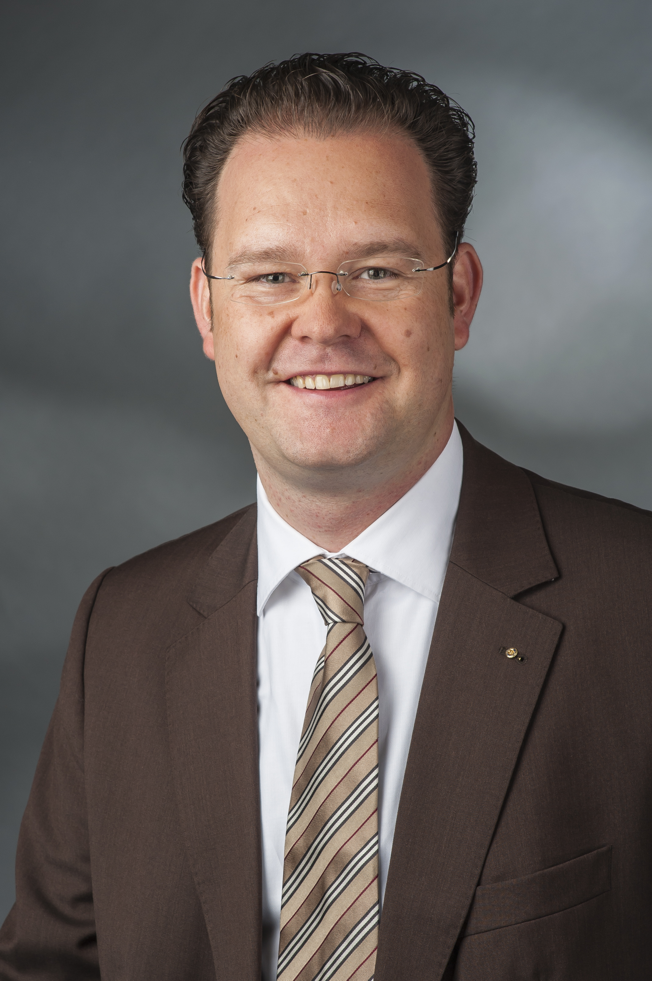 Tankred Schipanski (* 30. Dezember 1976 in Leipzig) ist ein deutscher Politiker (CDU). Seit der Bundestagswahl 2009 ist er direkt gewählter Abgeordneter des Bundestagswahlkreises 192 (Gotha – Ilm-Kreis).